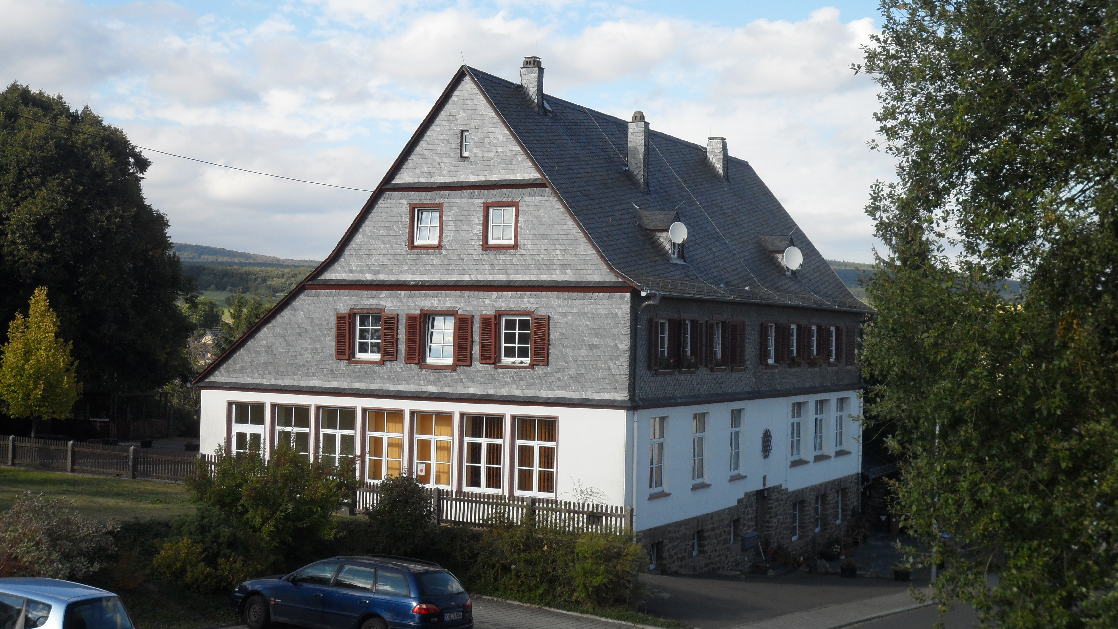 Winterbach (Soonwald), Bergstraße 10, ehemalige Schule.